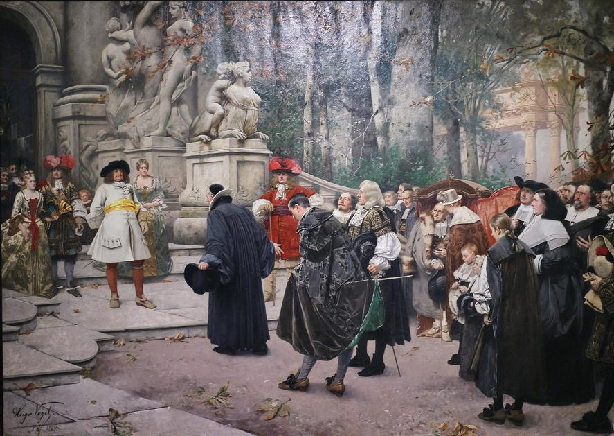 Hugo Vogel - Empfang der Refugies (Hugenotten) durch den Großen Kurfürsten im Potsdamer Schloss, 1685. Abgebildet: Der Große Kurfürst, hinter ihm die Kurfürstin, zur Linken der Kronprinz, der spätere König Friedrich I., mit Gattin und Gefolge. Rechts mit ausladender Kopfbedeckung Geheimrat Joachim Ernst von Grumbkow. Der einer Sänfte entstiegene alte Herr ist David Ancillon der Ältere. (Quelle)